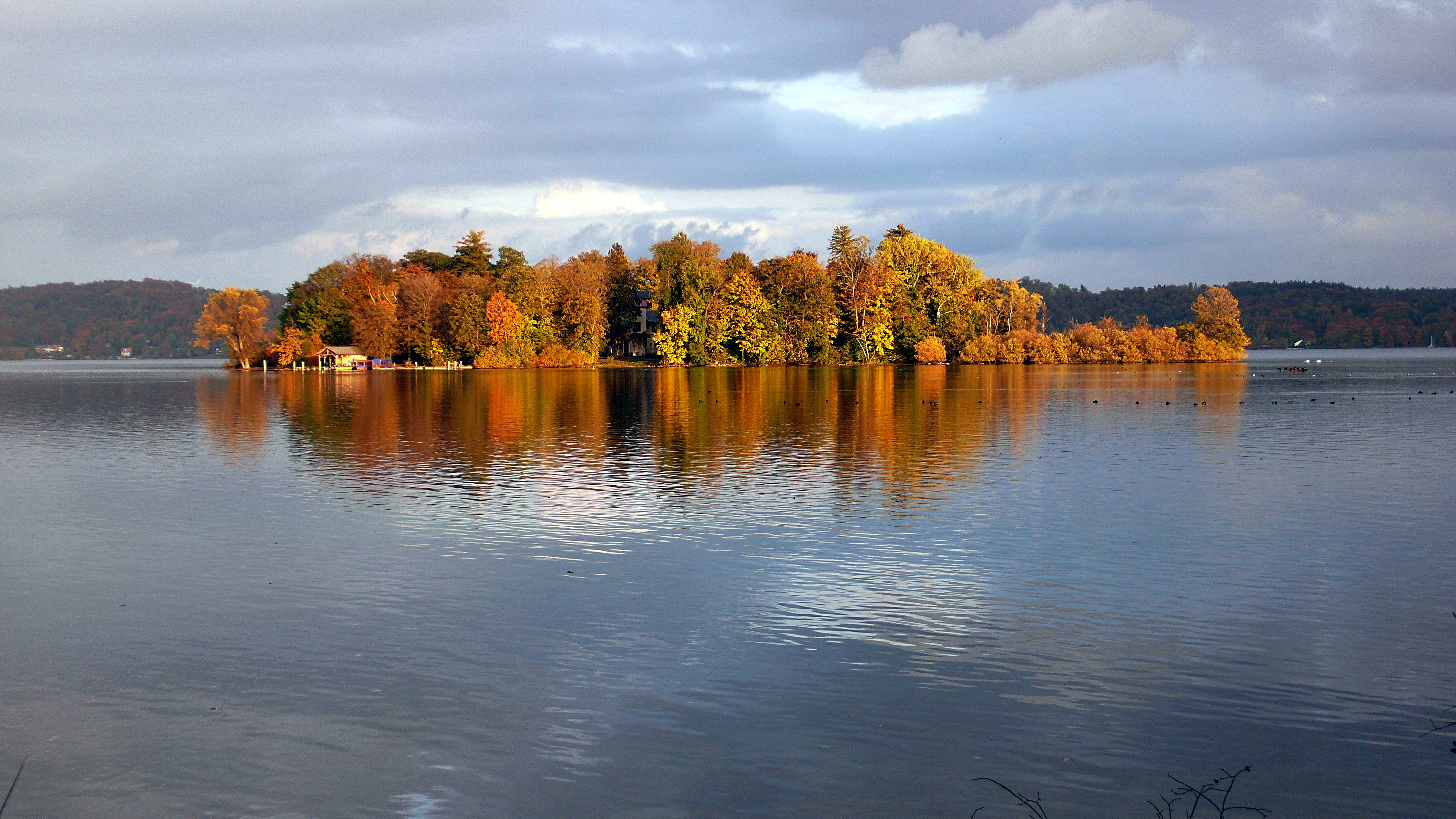 Roseninsel vom Feldafinger Park